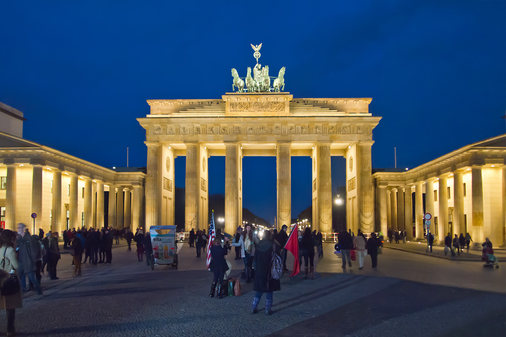 Brandenburg Gate from Pariser Platz